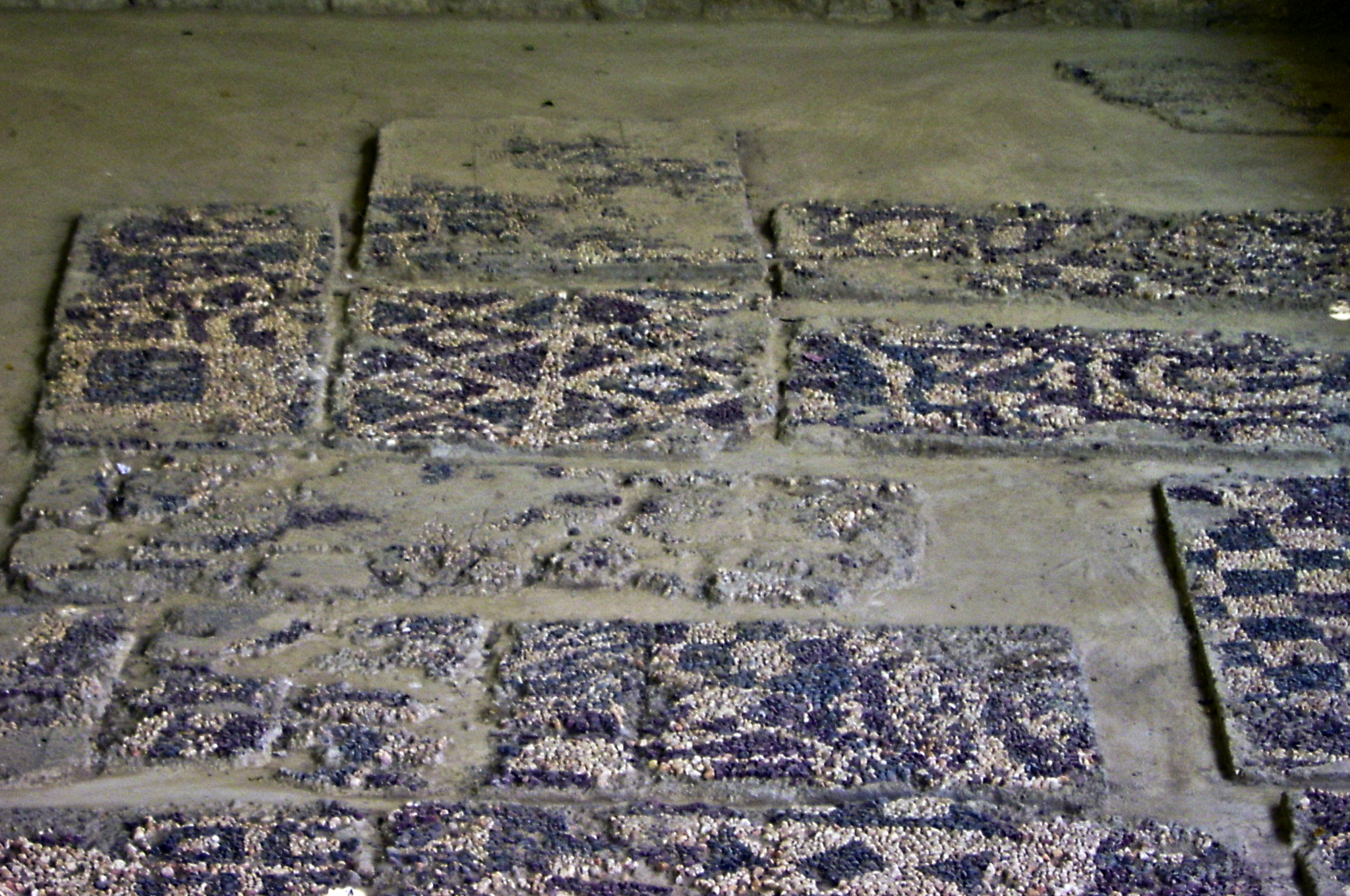 Phrygian pebble mosaic from Gordion Βοτσαλωτό επιδαπέδιο ψηφιδωτό από το Γόρδιον